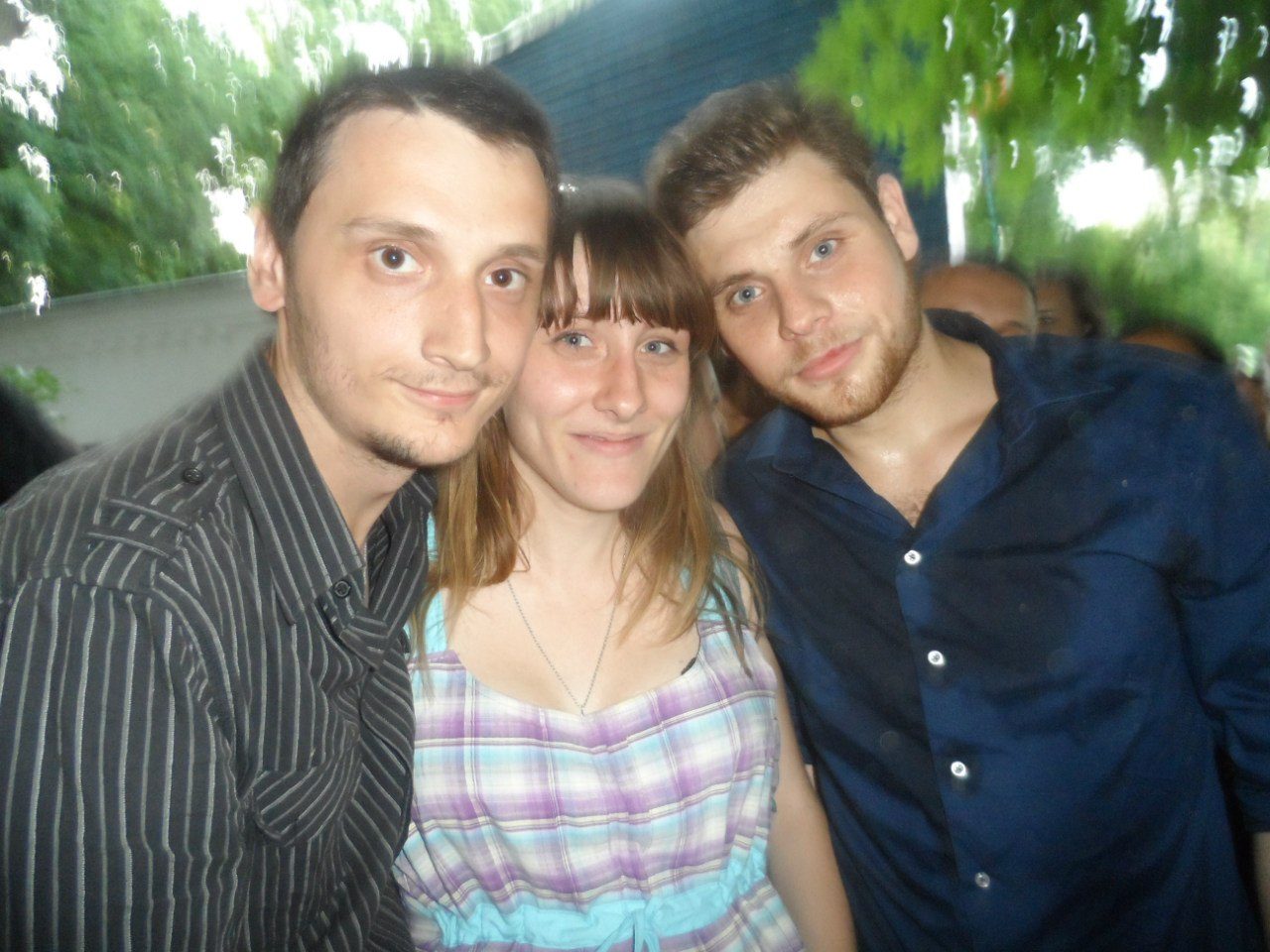 Полуфиналист Х фактора